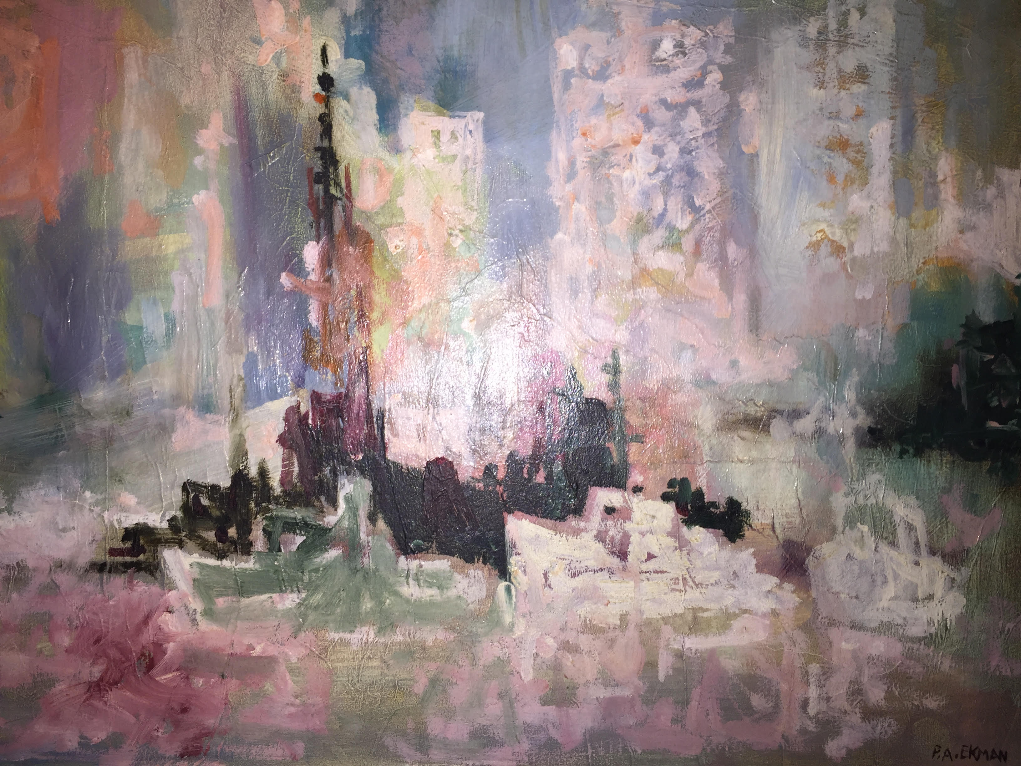 tableau 45 x 54